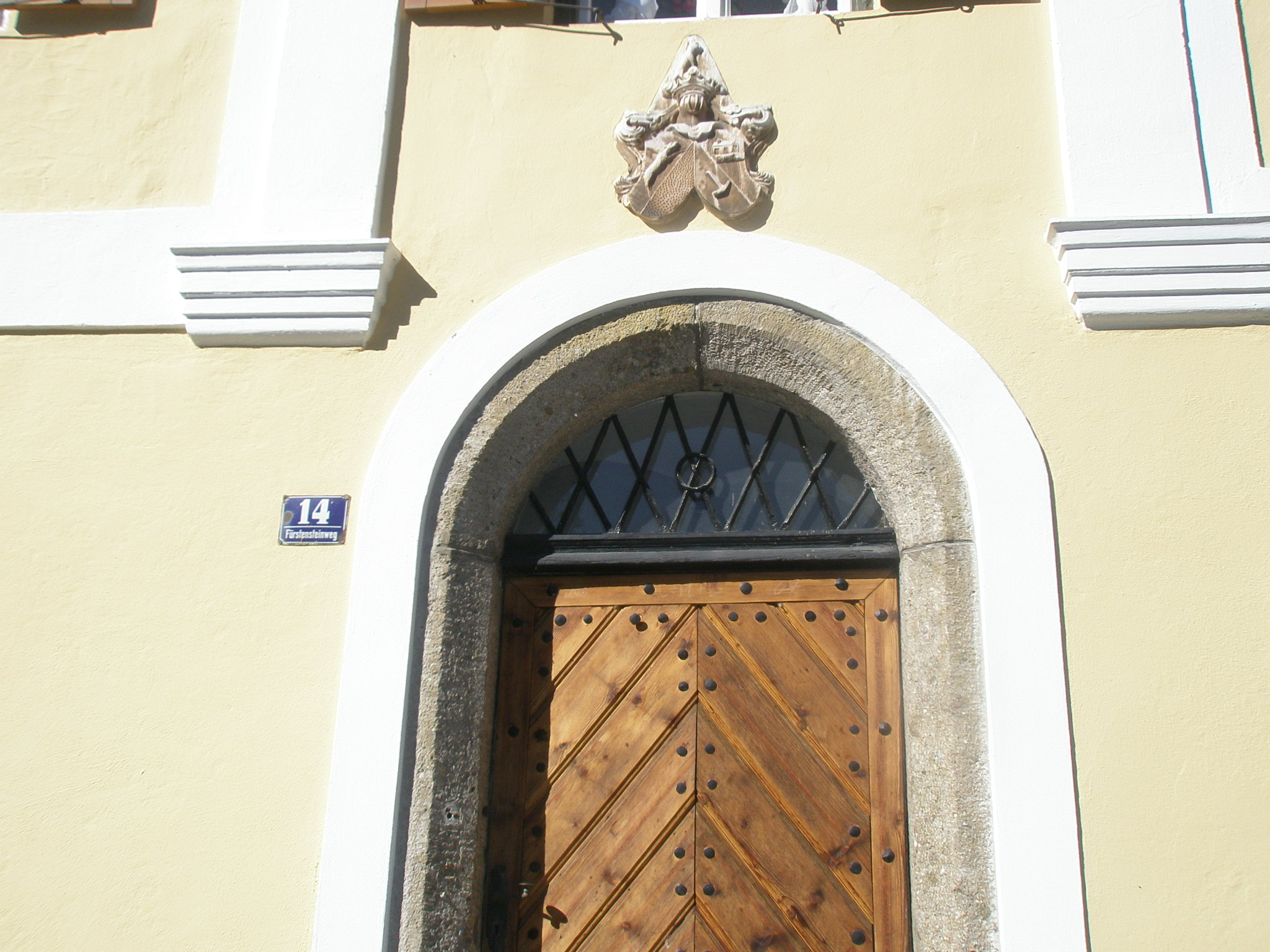 Schloss Fürstenstein, Eingang mit Wappen, Berchtesgaden